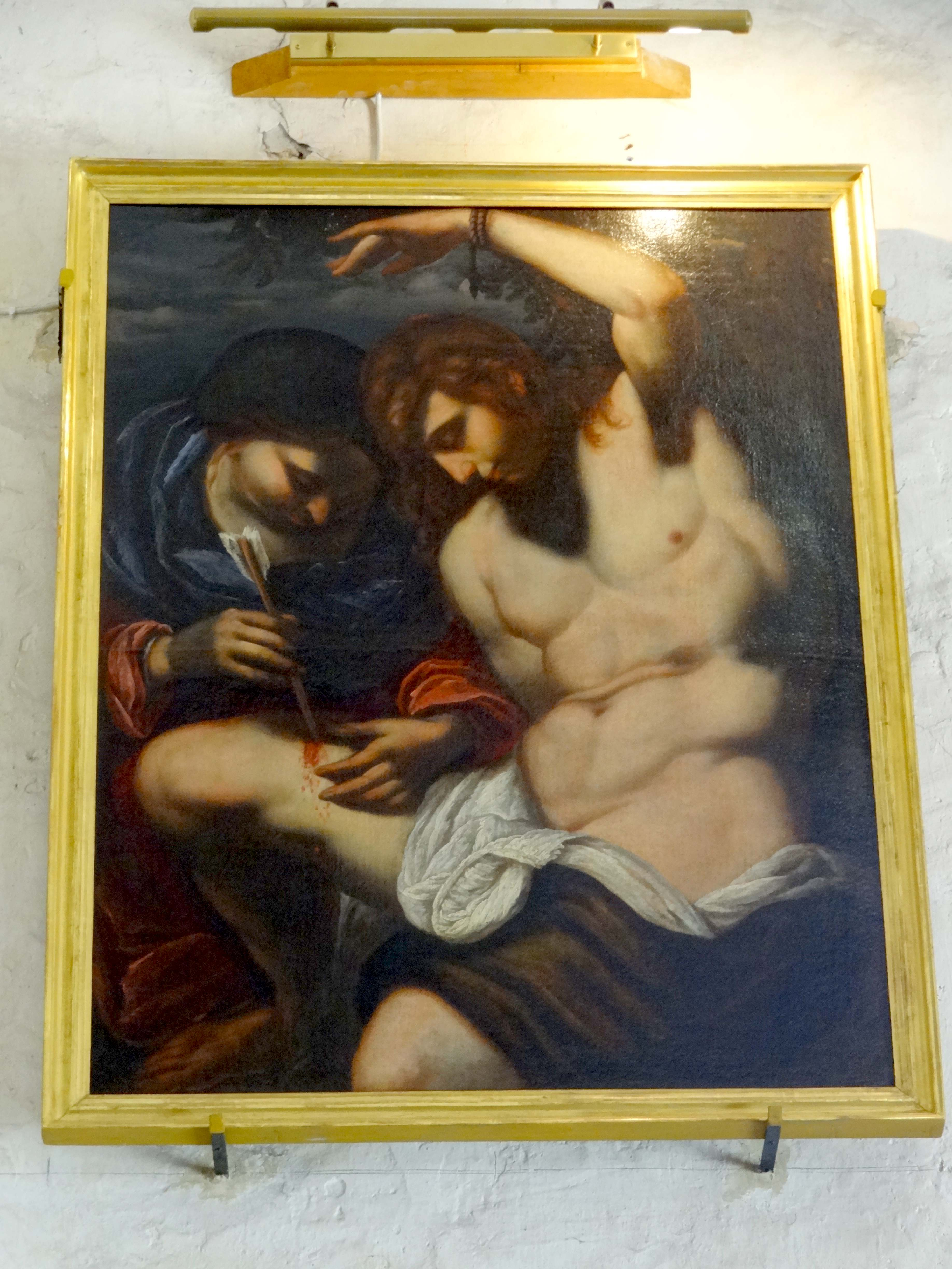 Mobilier de l'église - voir titre.